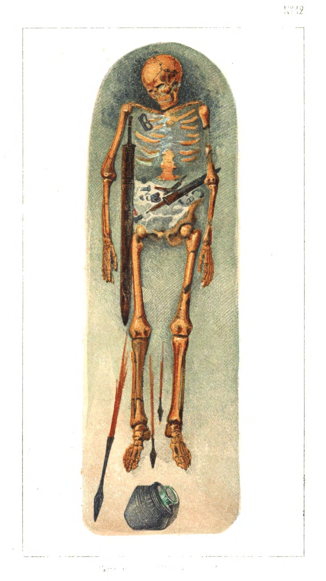 Das germanische Todtenlager bei Selzen, Grab 12